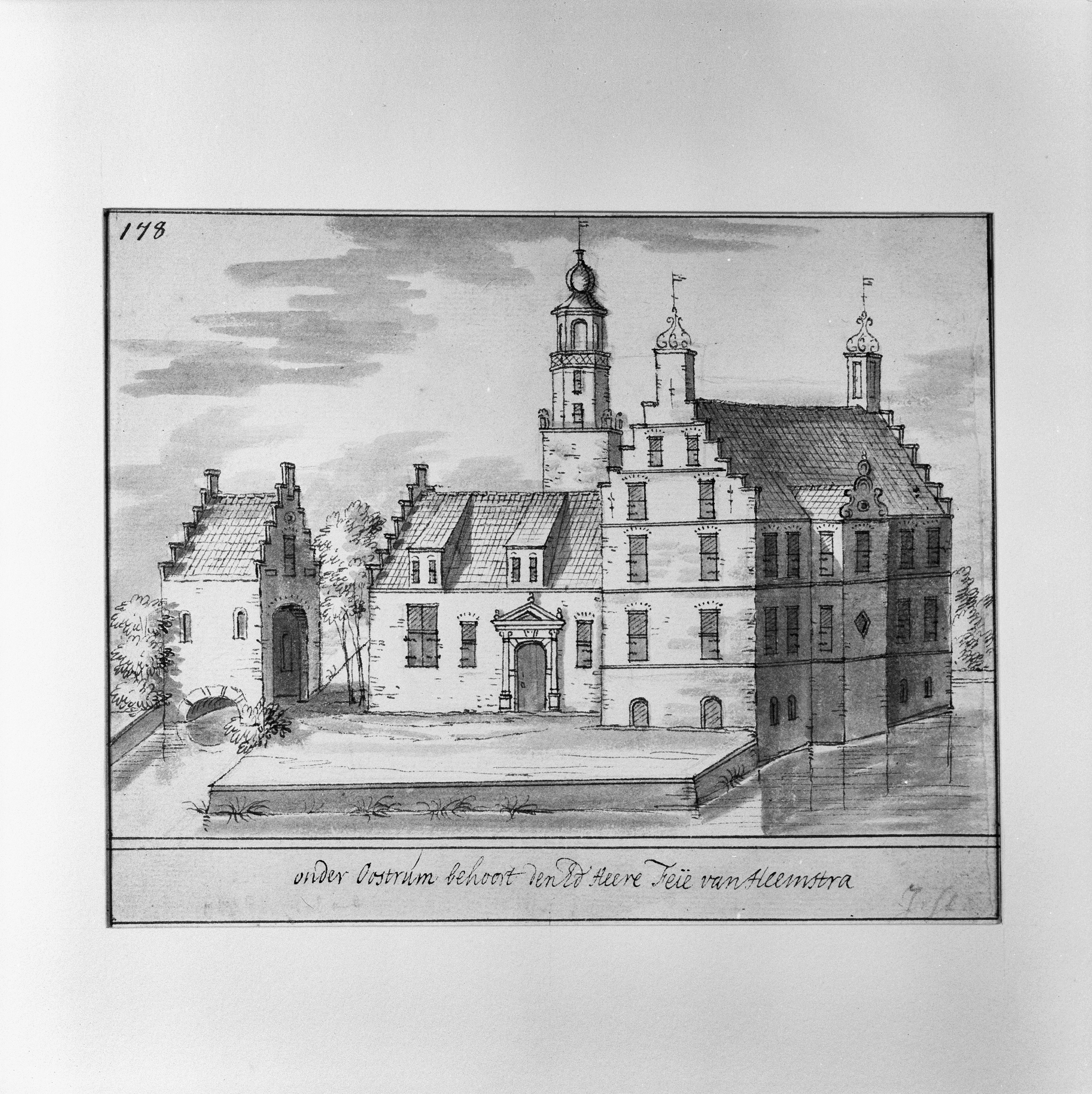 Huis Fe‹e van Heemstra 17.. Collectie Fries Museum